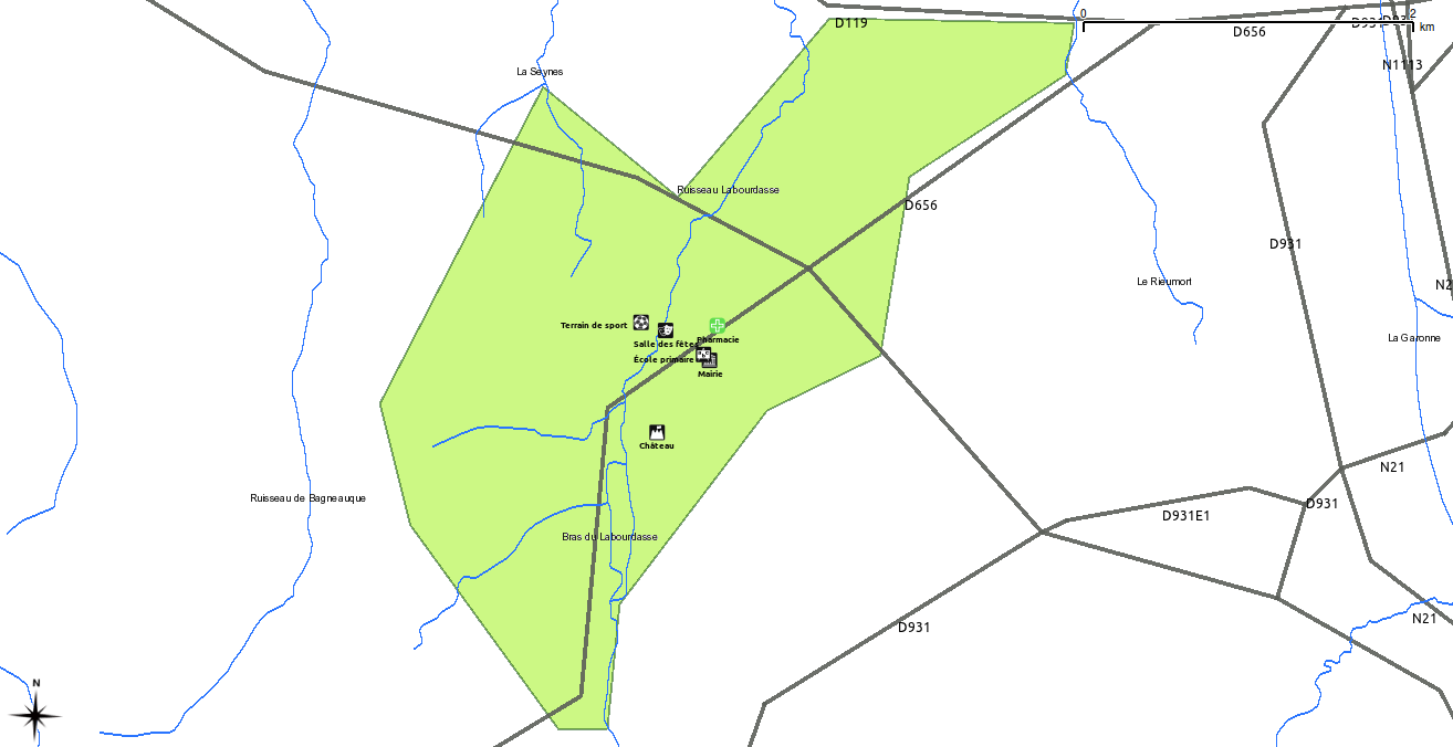 Carte du village et de ses principaux services Ænglisc: Map of the City with its main services